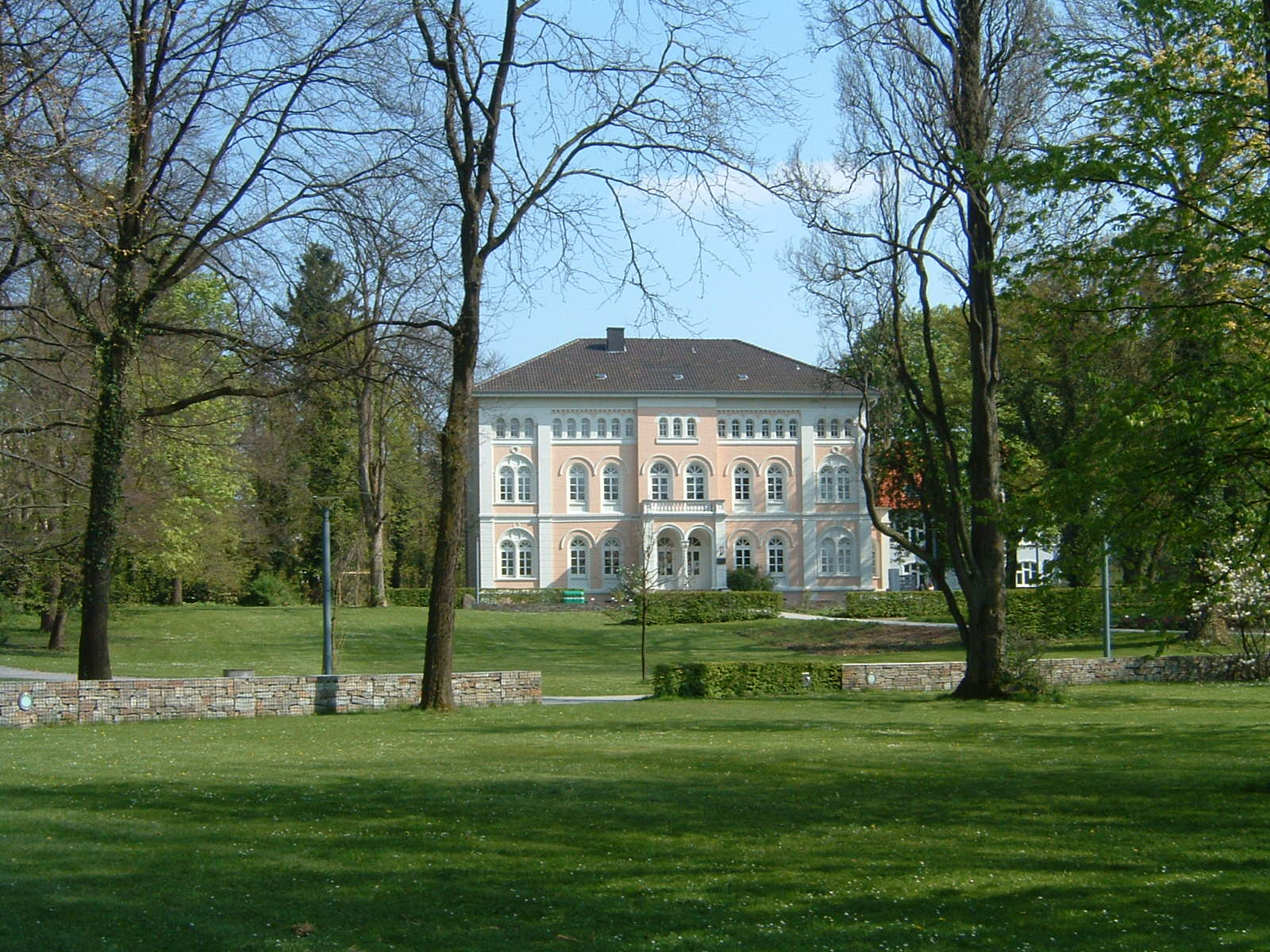 „Prinzenpalais“, ein villenartiges klassizistisches Kurmittelhaus von 1853-54 im alten Kurpark Bad Lippspringe